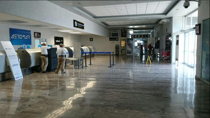 mostradores de documentación aeropuerto amado nervo